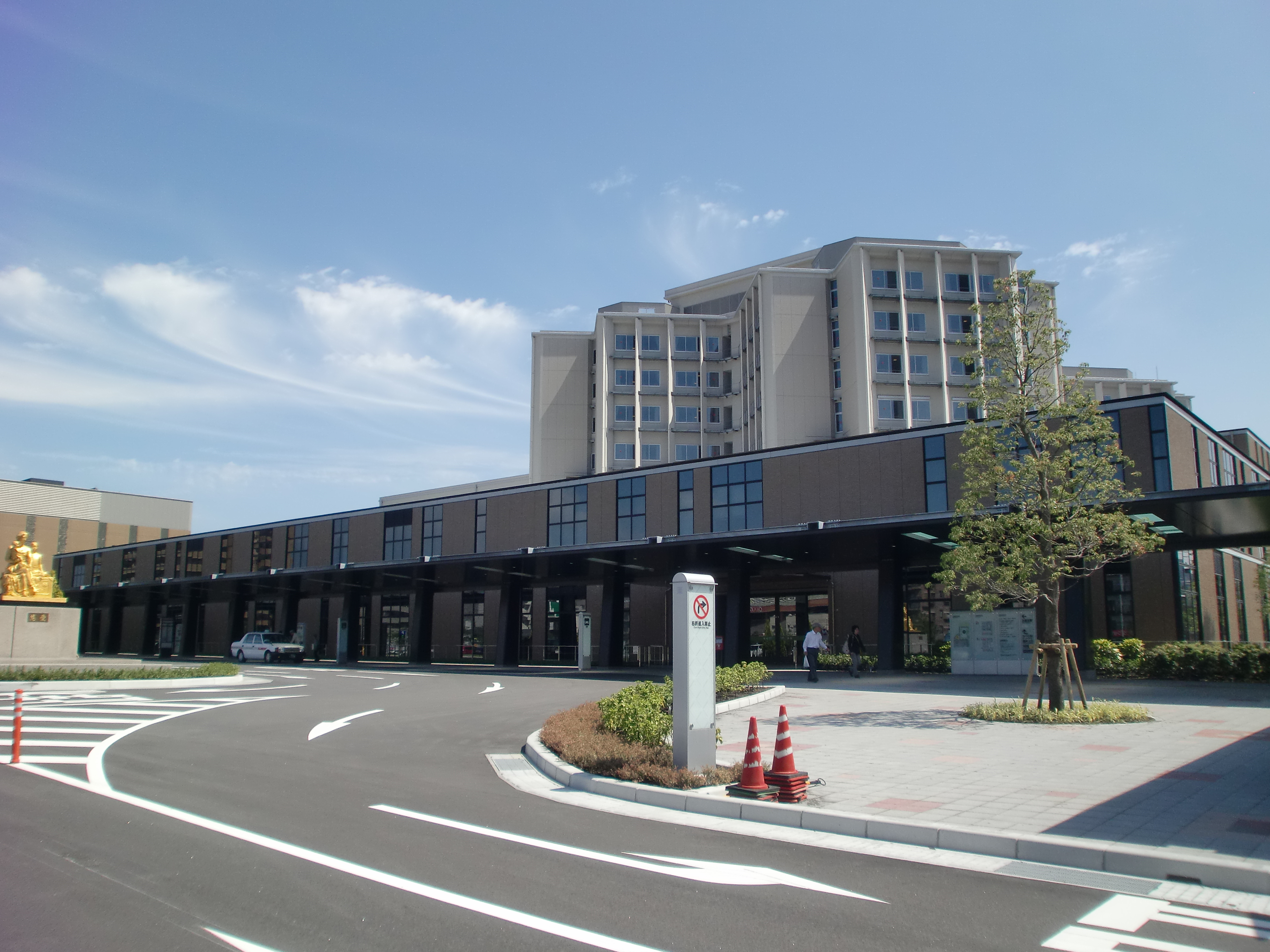 鹿児島市立病院（2015年5月1日移転後）の正面玄関付近。